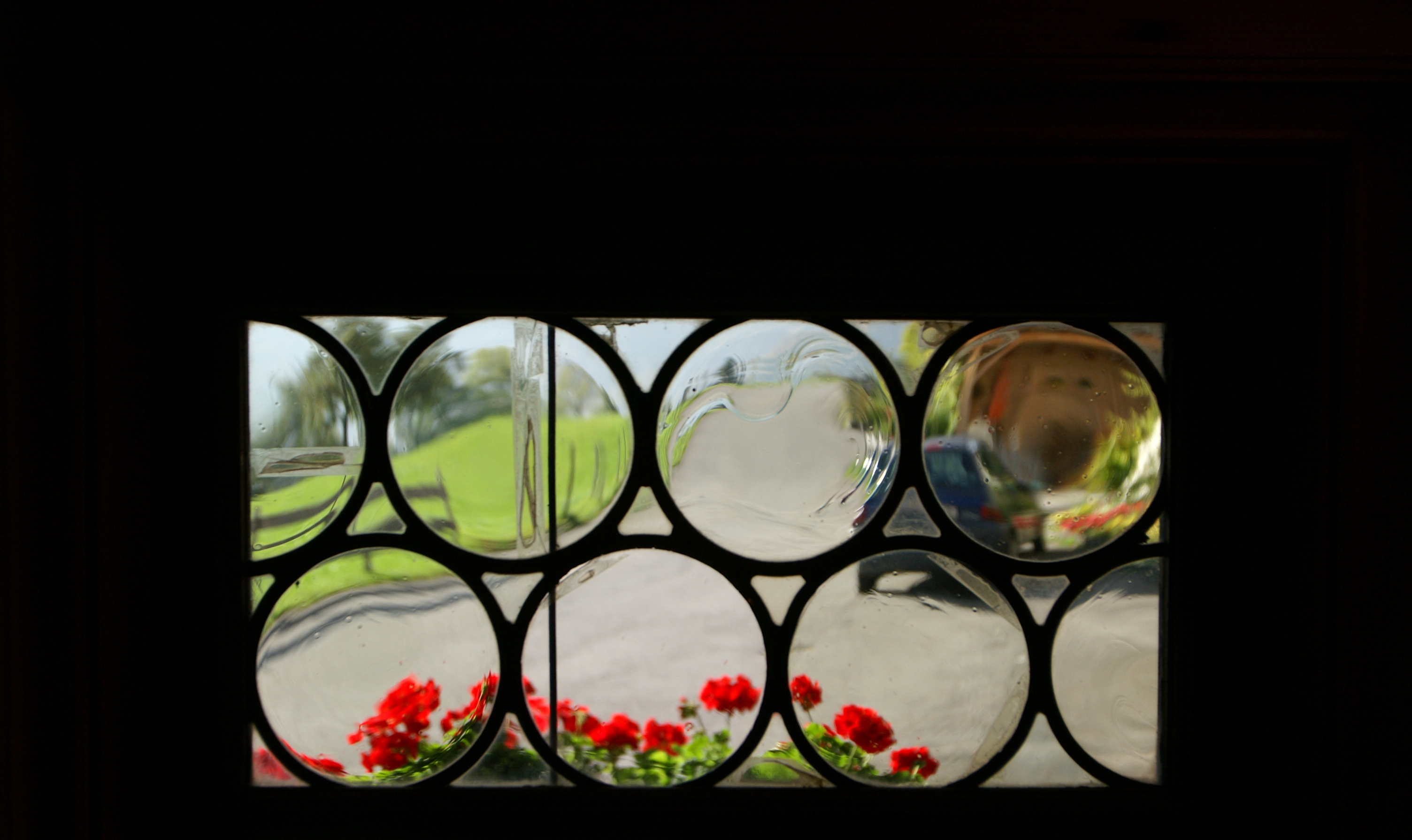 Angelika Kauffmann-Museum in Schwarzenberg im Bregenzerwald